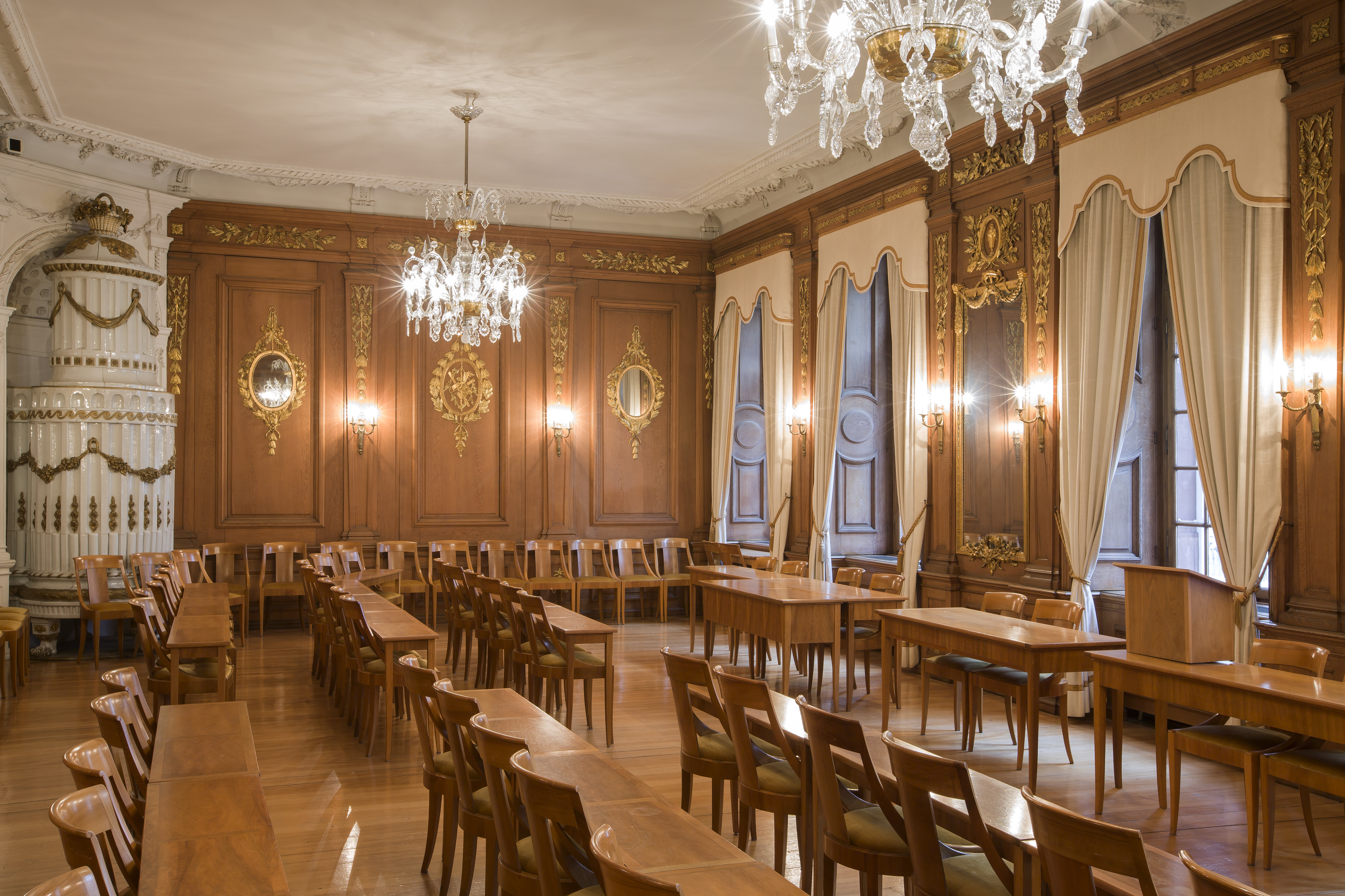 Der Bürgergemeinderat versammelt sich im Bürgergemeinderatssaal im Basler Stadthaus.